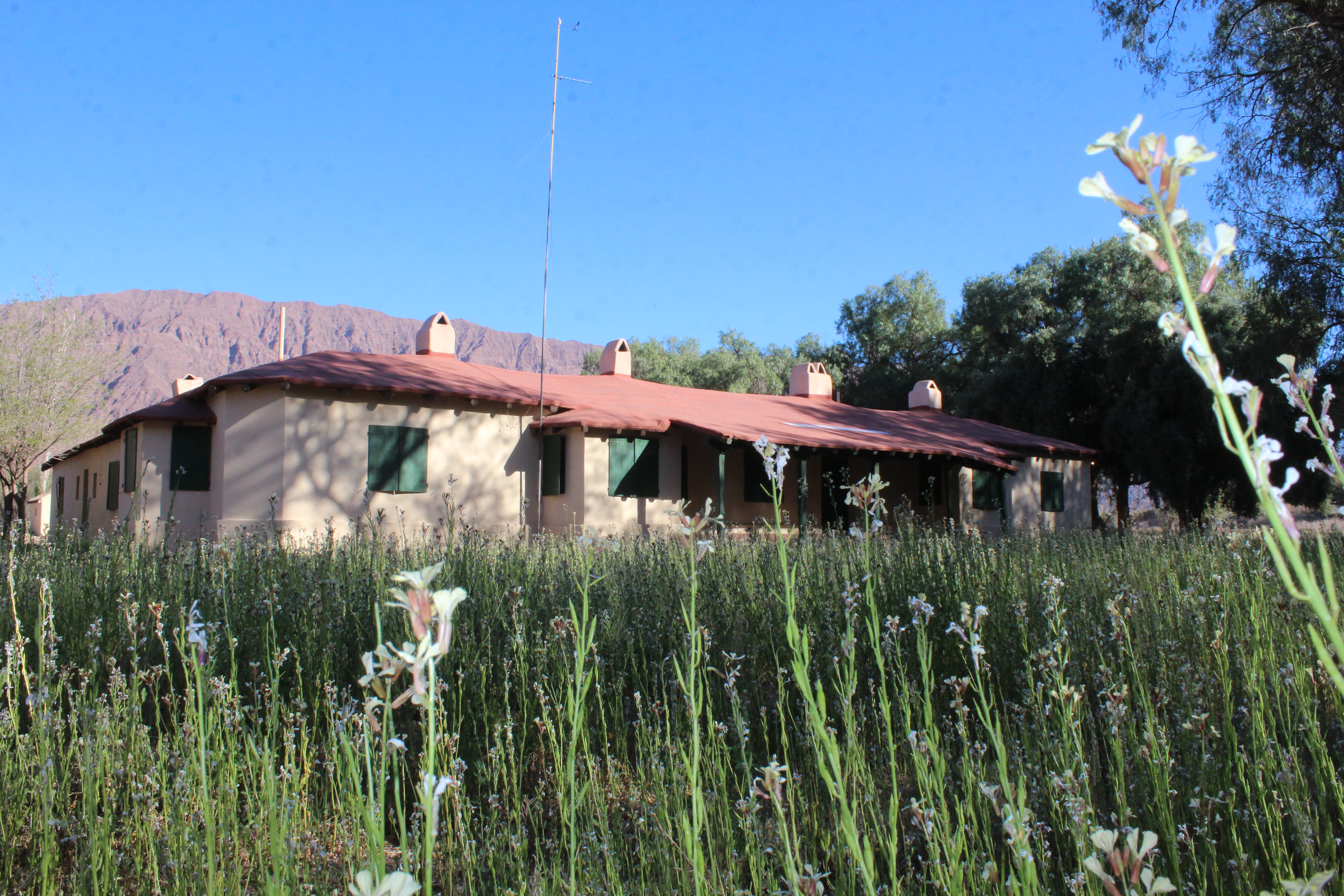 Un camino que conduce desde la entrada de Vinchina, al oeste, nos lleva por un sendero de pinos a la entrada de la Finca Buena Vista, hoy un emprendimiento privado, dedicado a la producción de alfalfa, una importante vivienda preside este lugar, construida a principios del siglo pasado, con una arquitectura de estilo inglés, en de forma de U con un patio central y las habitaciones a su alrededor, y en el ala derecha un departamento para el capataz, su primer dueño de apellido Roch es quien manda a construirla, fue restaurada conservando su estilo.